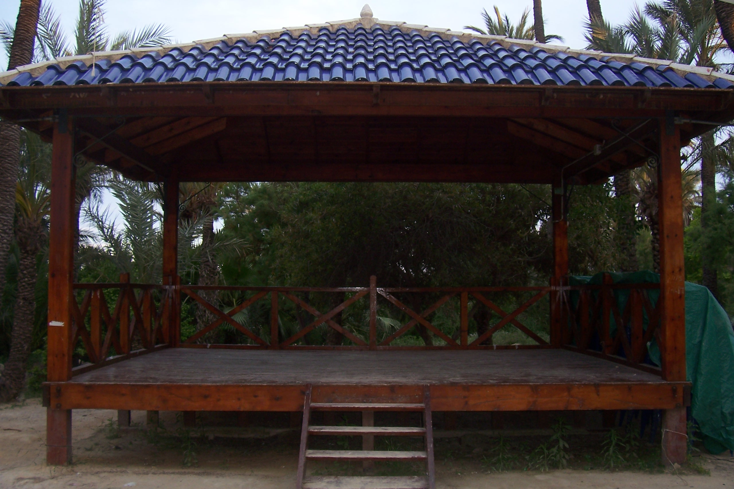 Foto del templete del parque